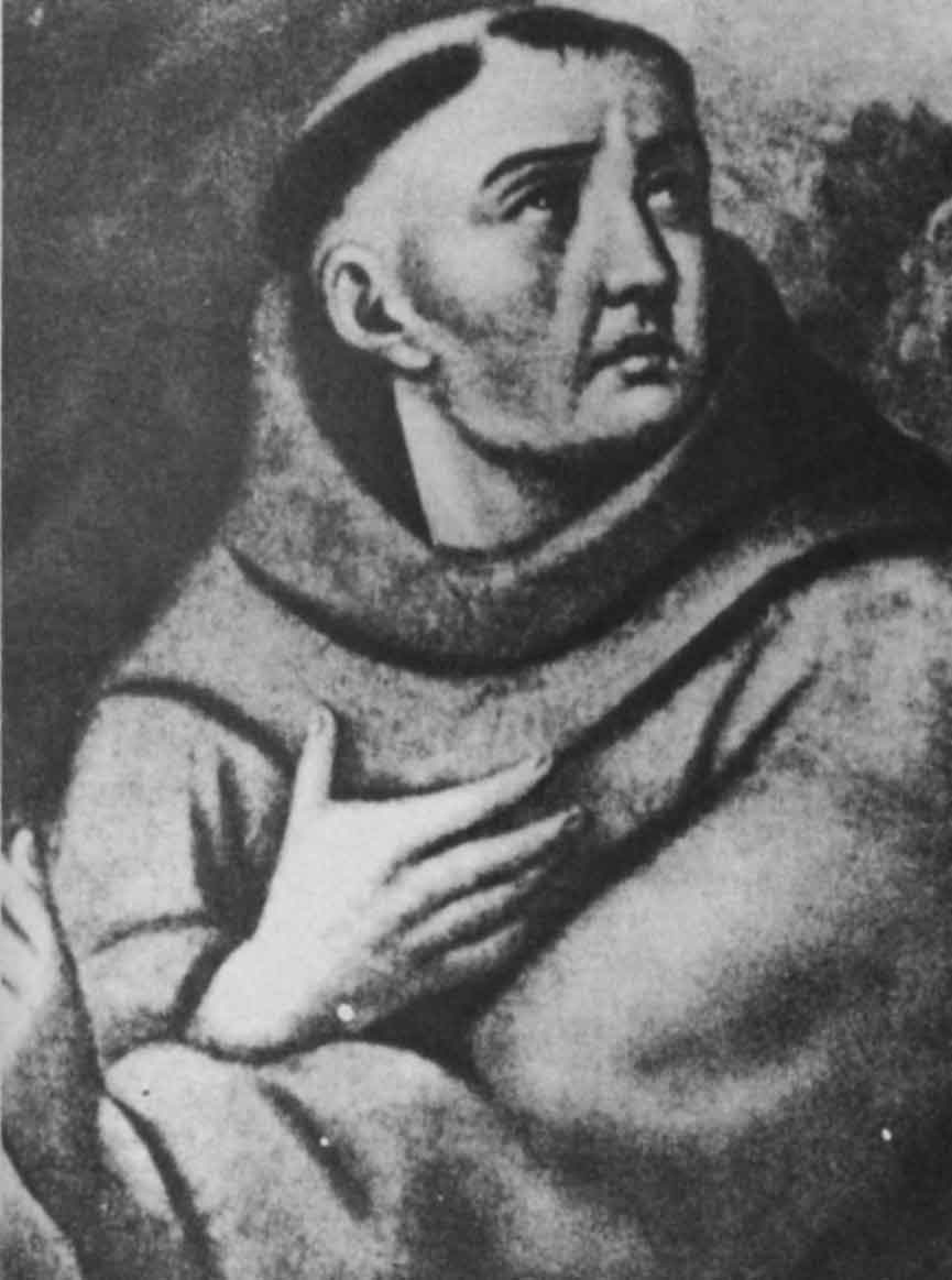 Imagen de FrayToribioDeBenavente